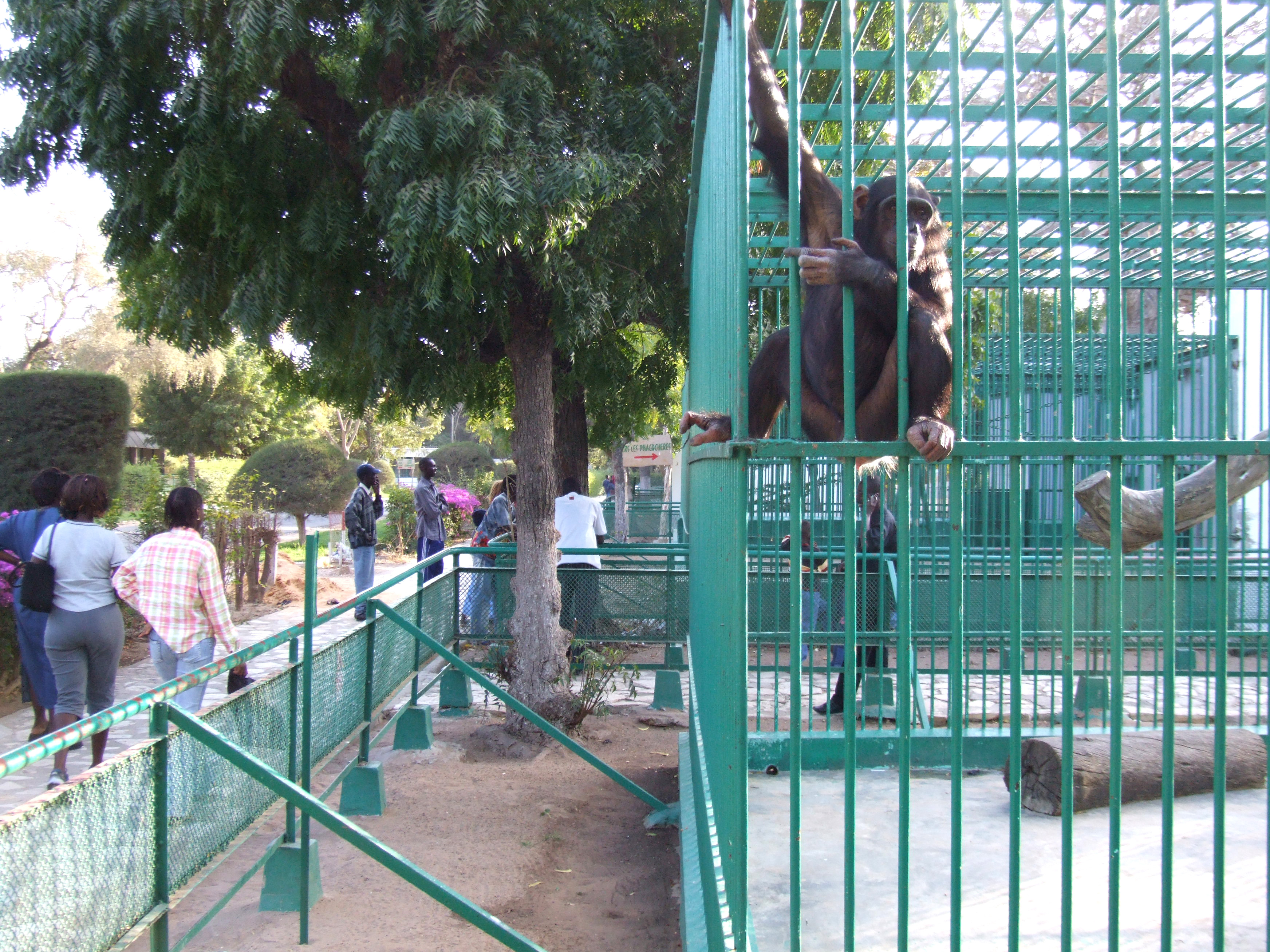 Parc forestier et zoologique de Hann (Dakar, Sénégal)